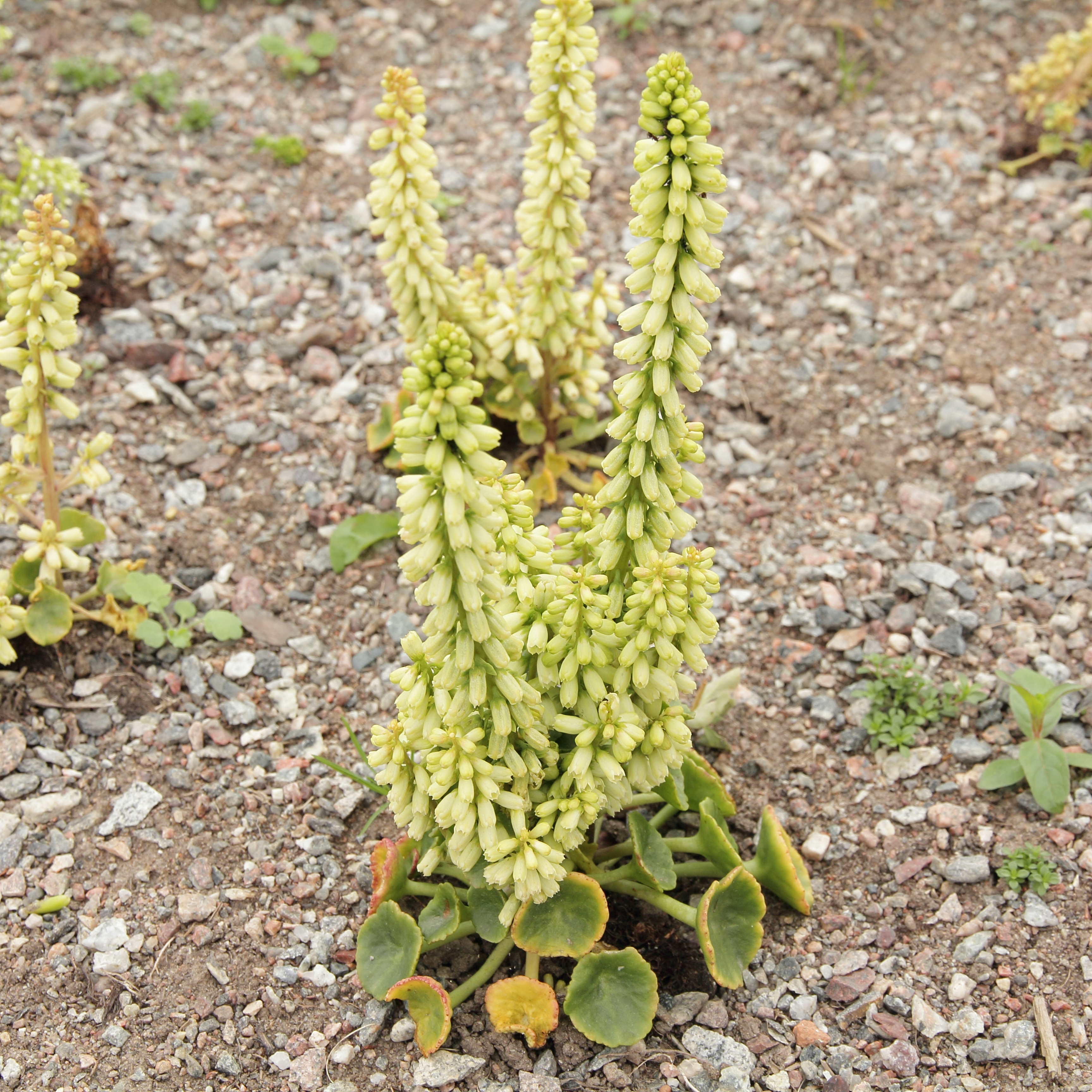 Umbilicus rupestris i Bergianska trädgården.